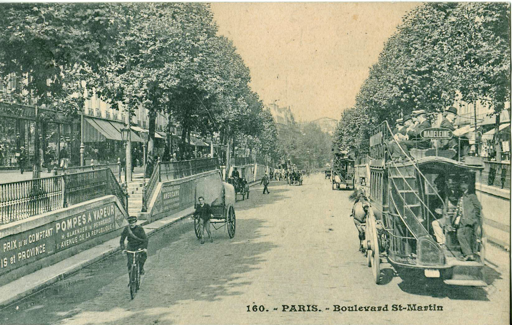 Carte postale ancienne, sans mention d'éditeur, b°160 : Paris - Boulevard Saint-Martin